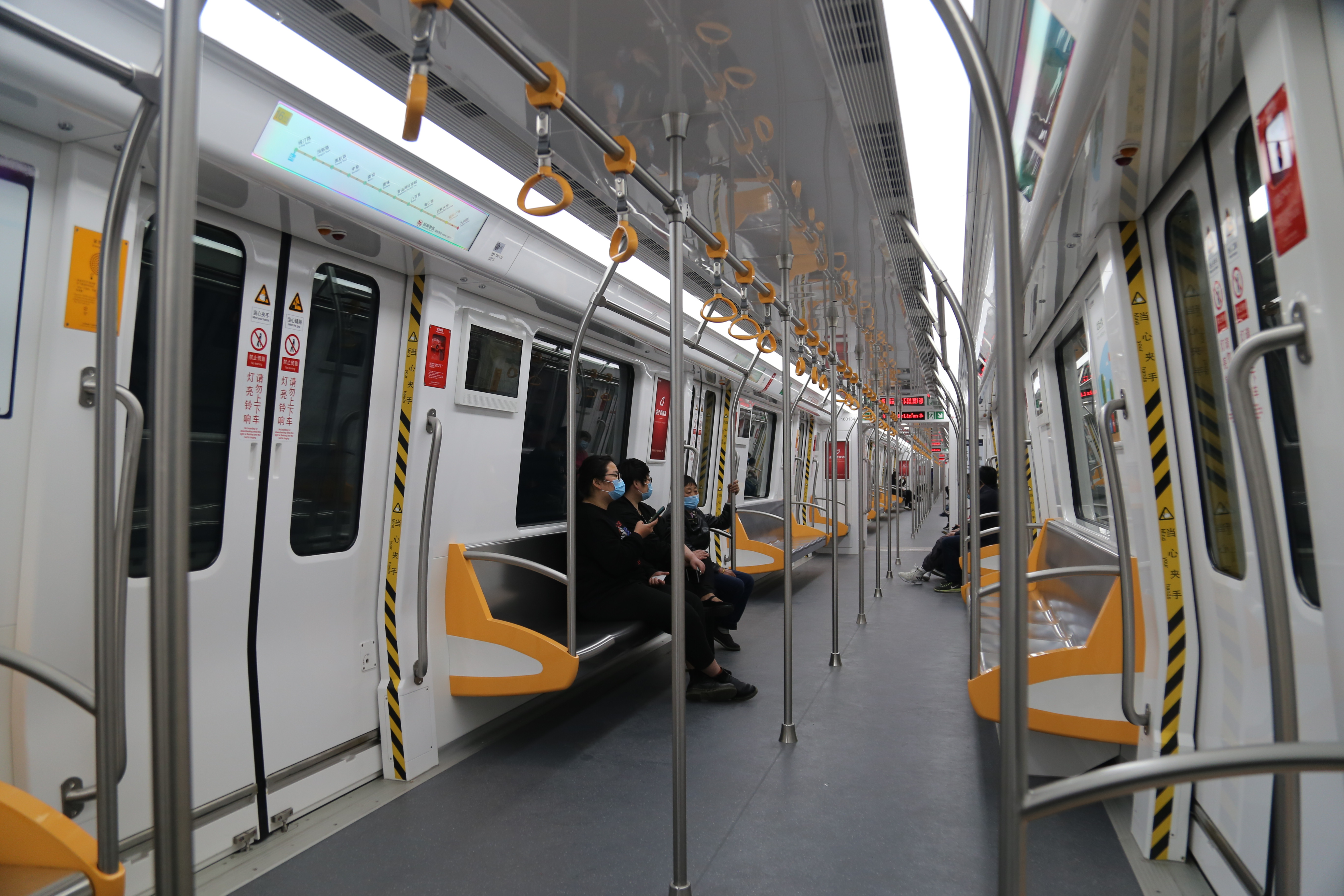 杭州地铁16号线车厢内部